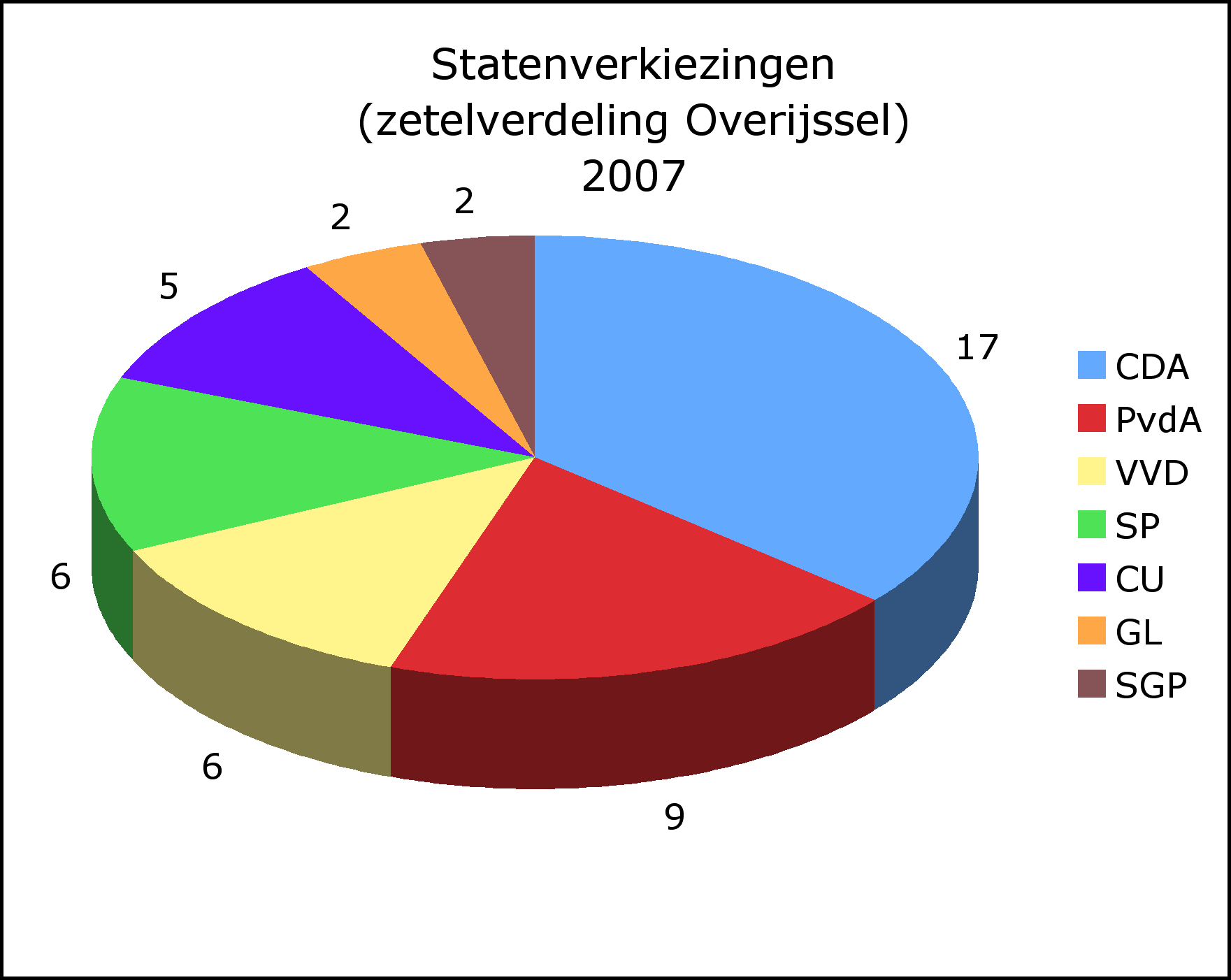 Uitslag provinciale statenverkiezingen Overijssel vertaald in zetels